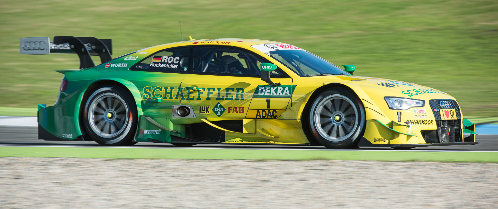 DTM,Deutsche Tourenwagen Masters,Hockenheimring,Mike Rockenfeller,Motorsport,Phoenix Racing GmbH,Schaeffler Audi RS 5 DTM